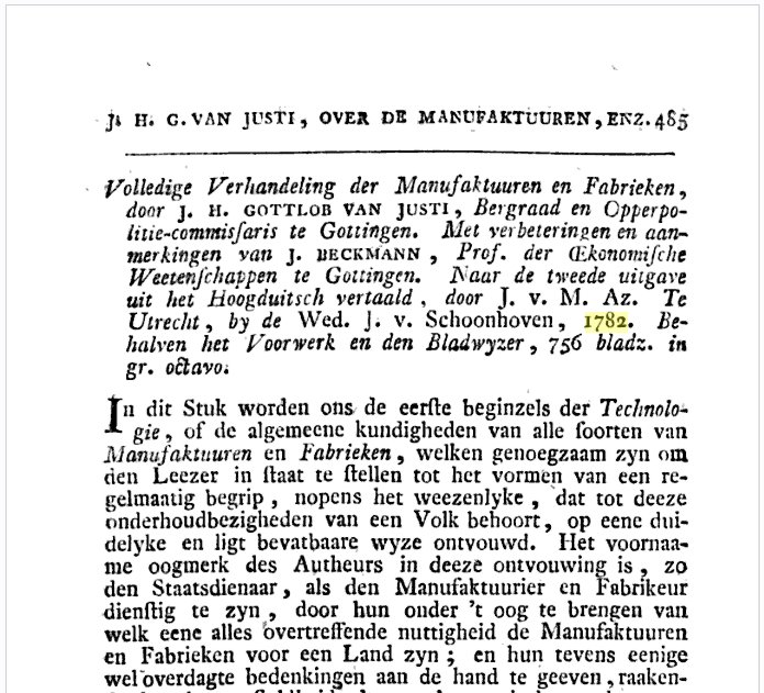 Vaderlandsche_Letteroefeningen 1782 p.485